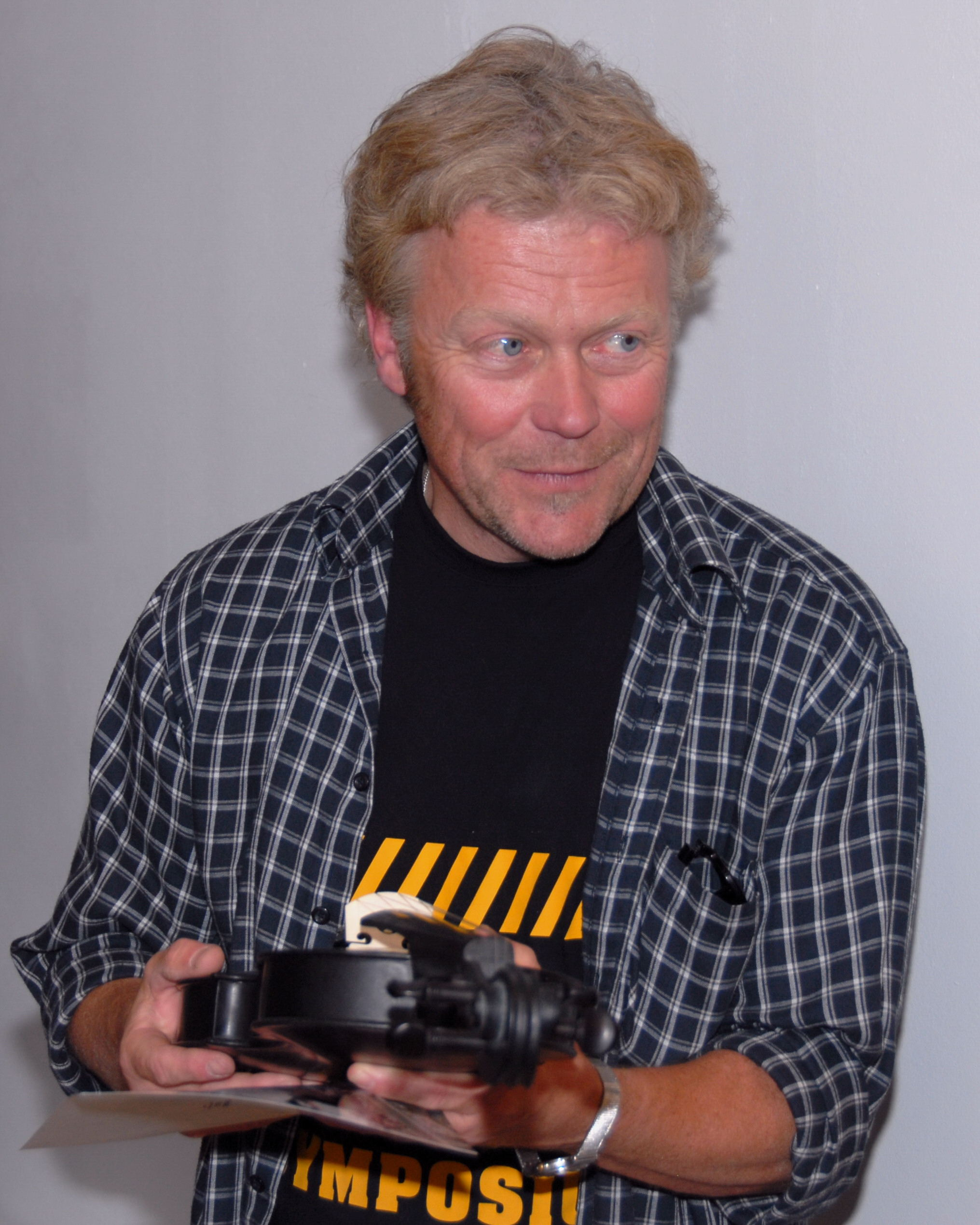 De Lars Widenfalk um Muse Symposium 2007.